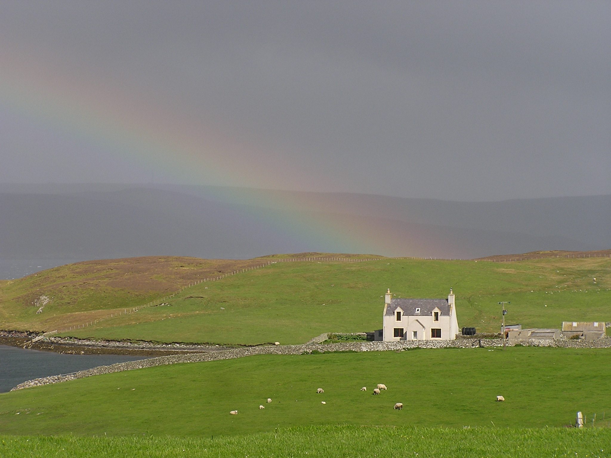 Regenbogen bei Lunna auf Mainland, Shetland